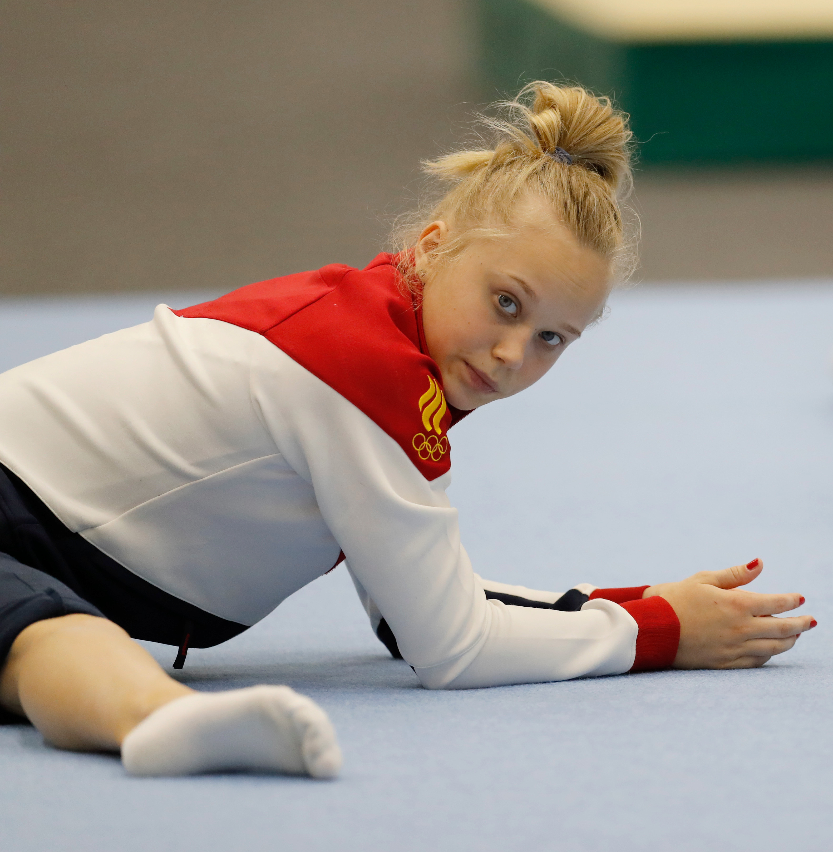 Rio de Janeiro - Equipe de ginástica artística da Rússia treina no Parque dos Atletas para os Jogos Olímpicos Rio 2016(Fernando Frazão/Agência Brasil)